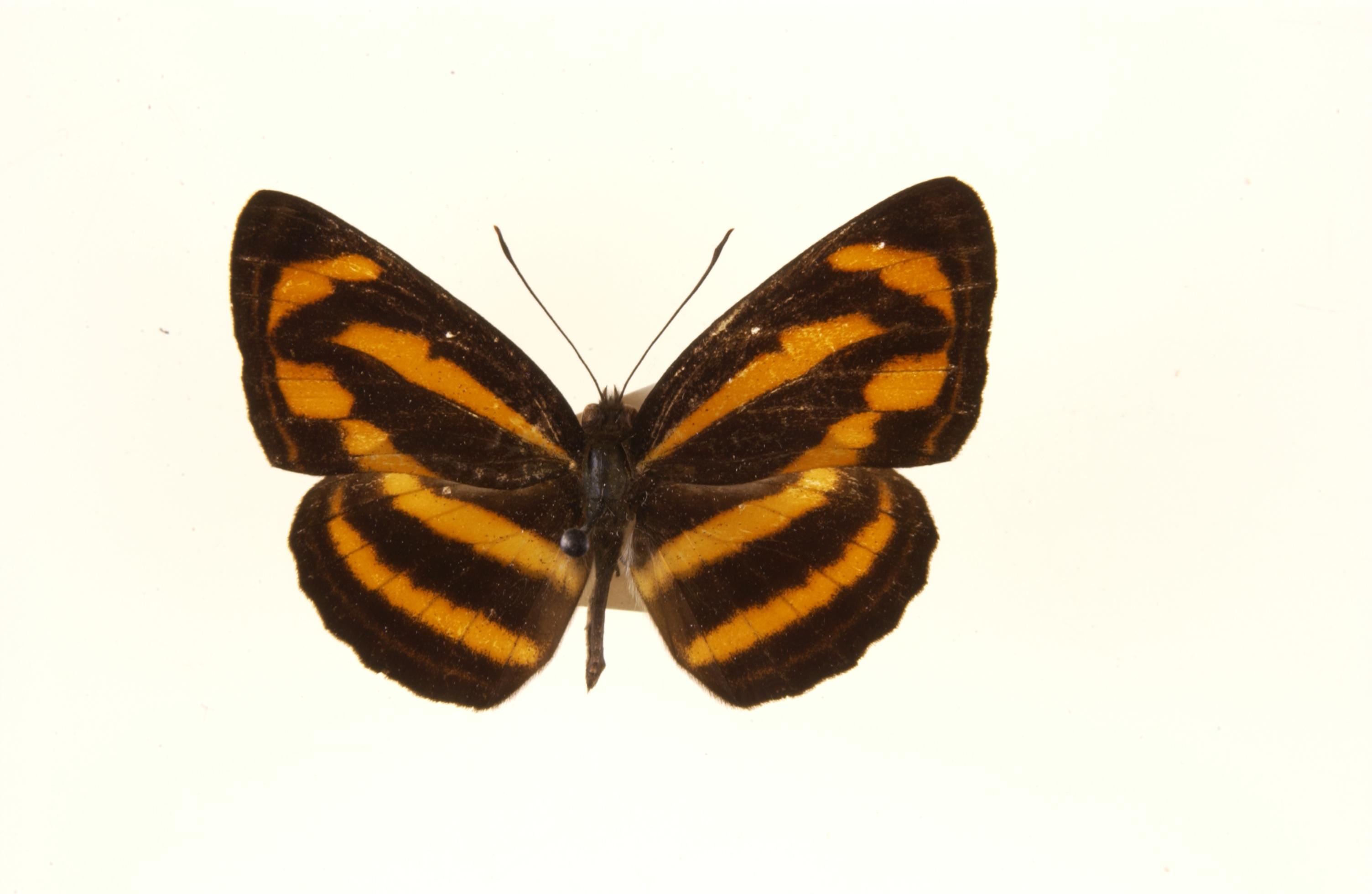 Neptis miah Malaya